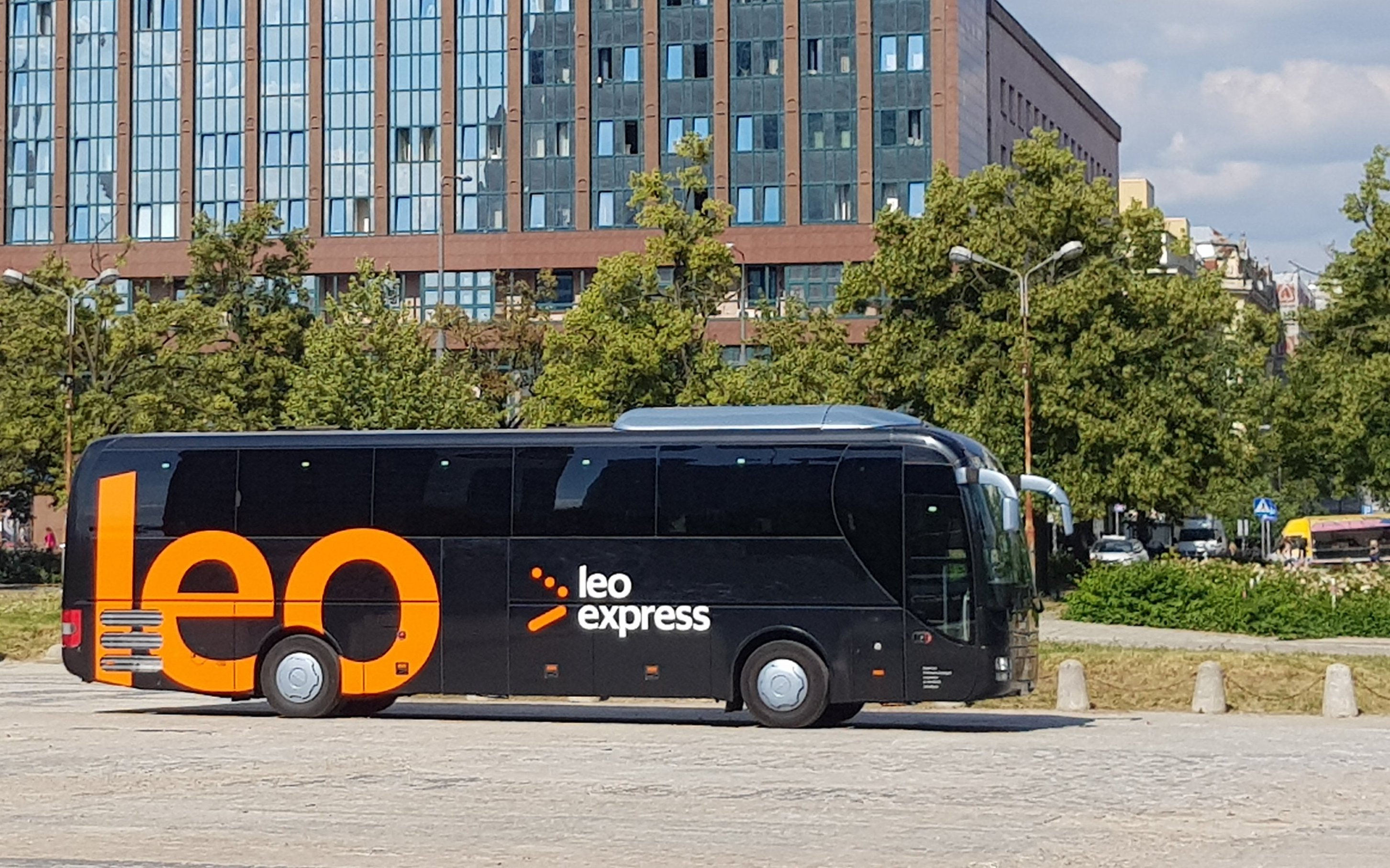 Autobus firmy Leo Express po rebrandingu, 2018